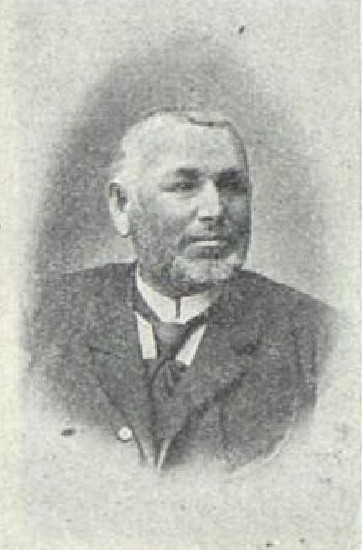 František Dorník (1851-1925), rakouský a český politik